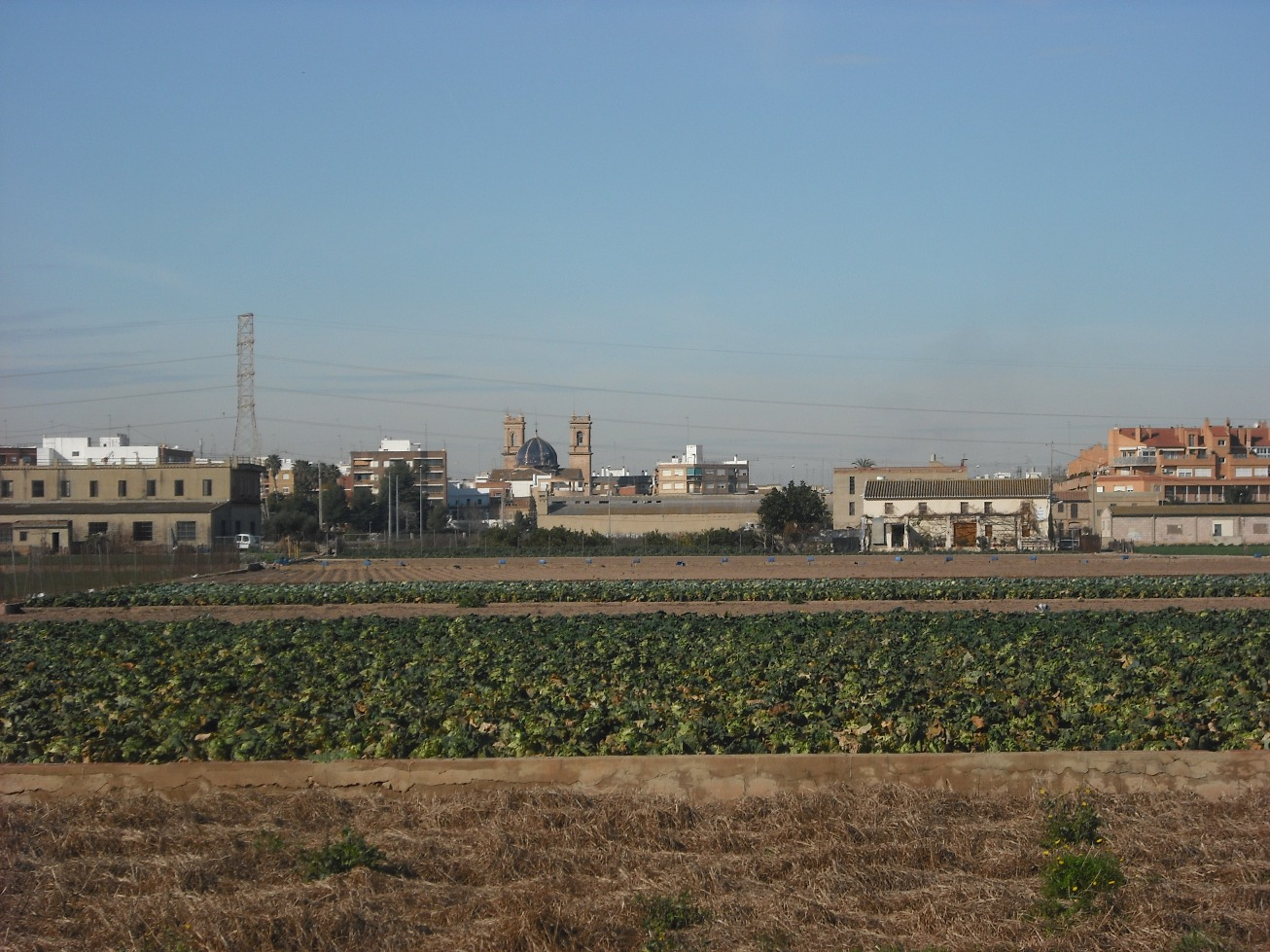 Vista de Almácera desde la vía Xurra